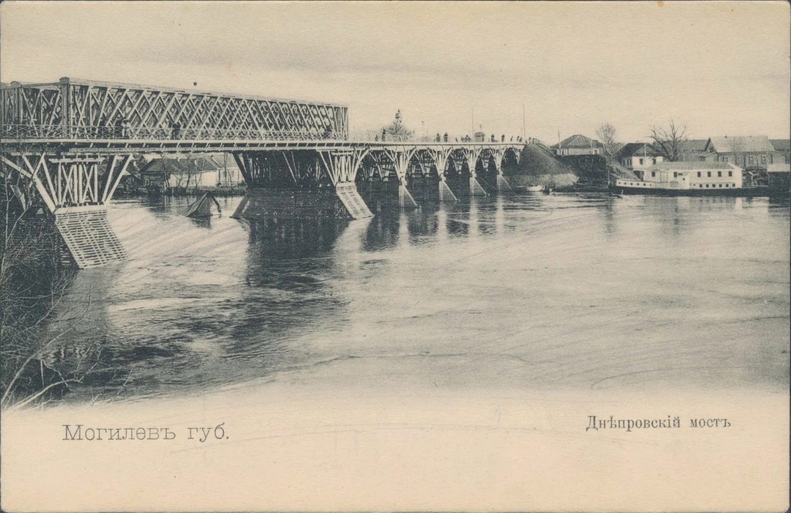 Беларуская (тарашкевіца): Магілёў (Mahiloŭ), Дняпроўскі мост (Dniaproŭski most)